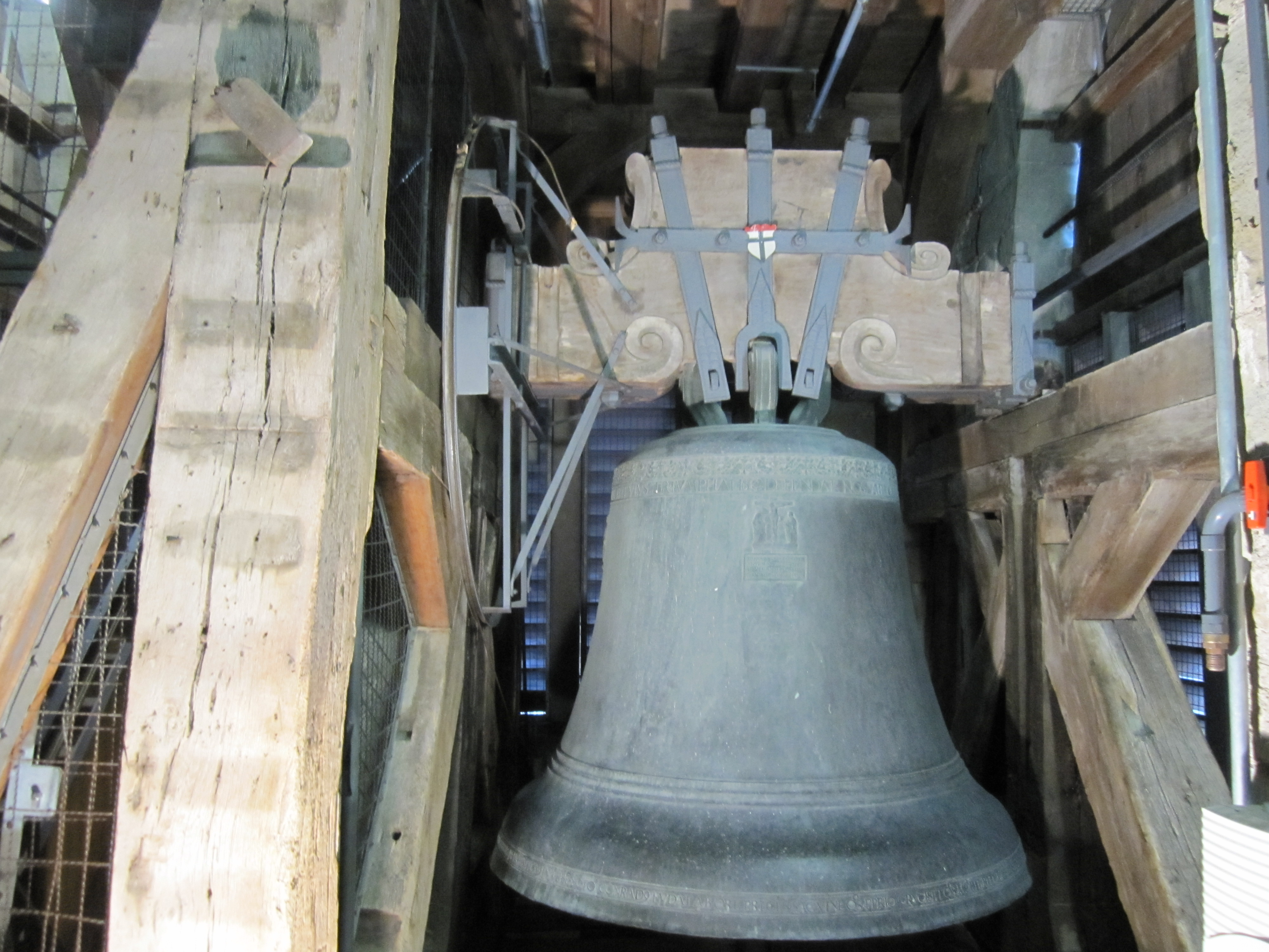 Die Ursulaglocke von 1584 im Konstanzer Münster. Sie hängt rechts des Turmaufganges und trägt am Glockenjoch das Konstanzer Wappen.